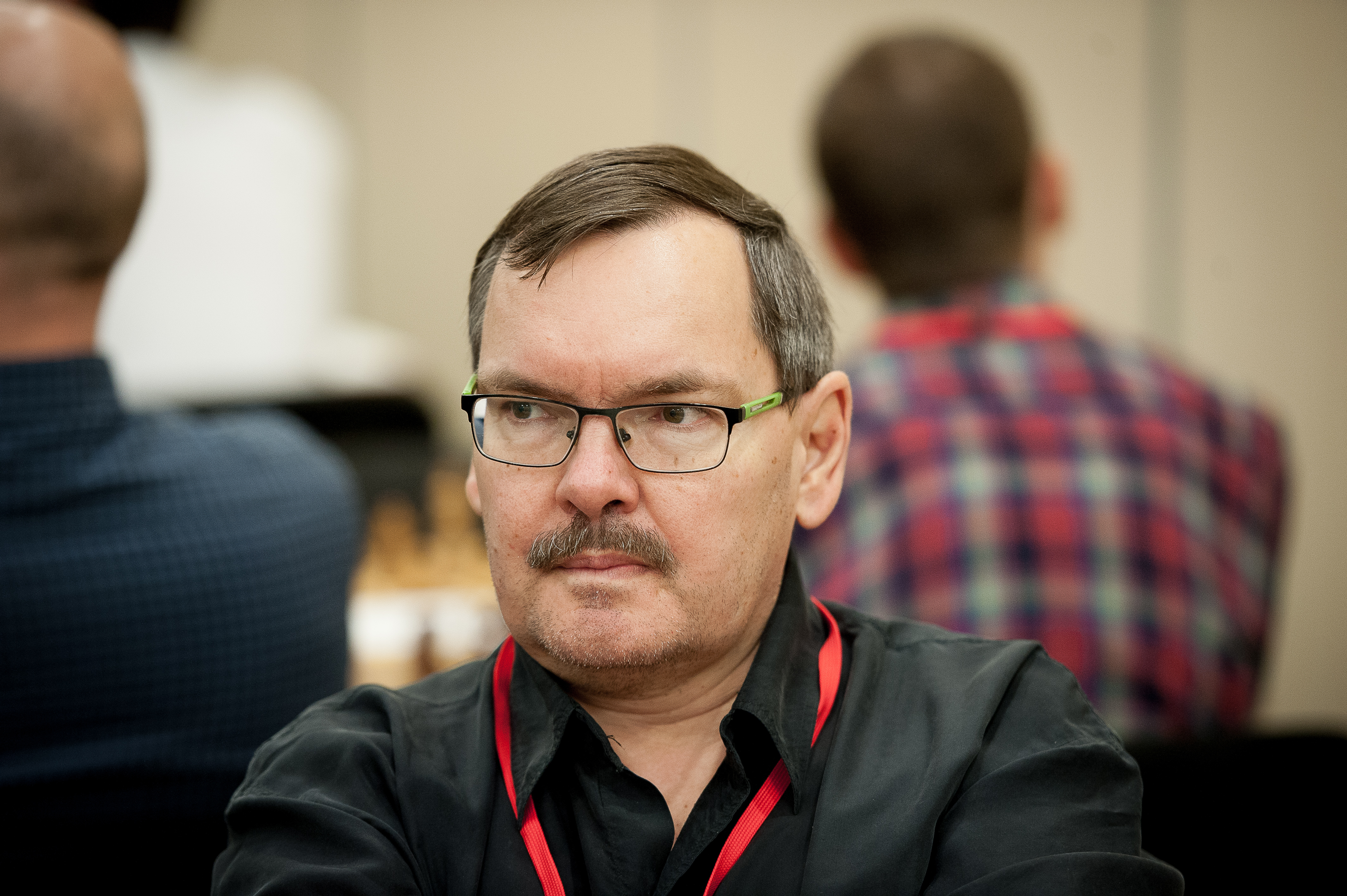 GM Jaan Ehlvest